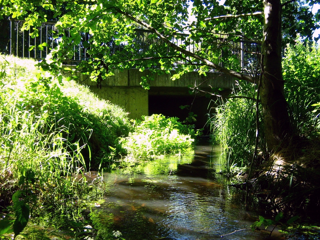 der Strehlower Bach bei Strehlow, Gemeinde Hohenmocker, Landkreis Demmin, Vorpommern. Er ist ein Nebenfluss des Augrabens.